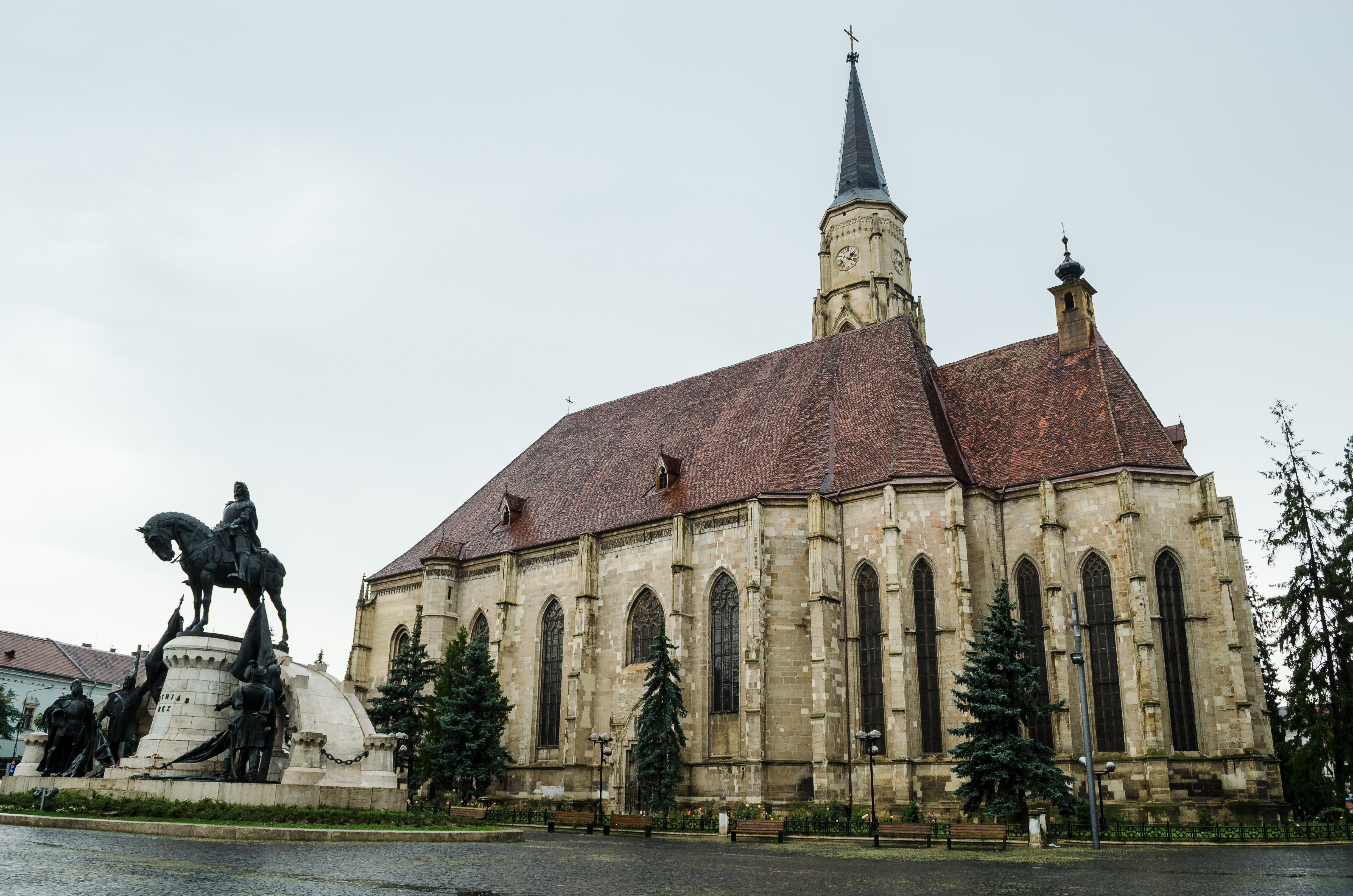 Fațada de sud a bisericii romano-catolice "Sfântul Mihail", cu statuia ecvestră a lui Matei Corvin în latura stângă a cadrului.